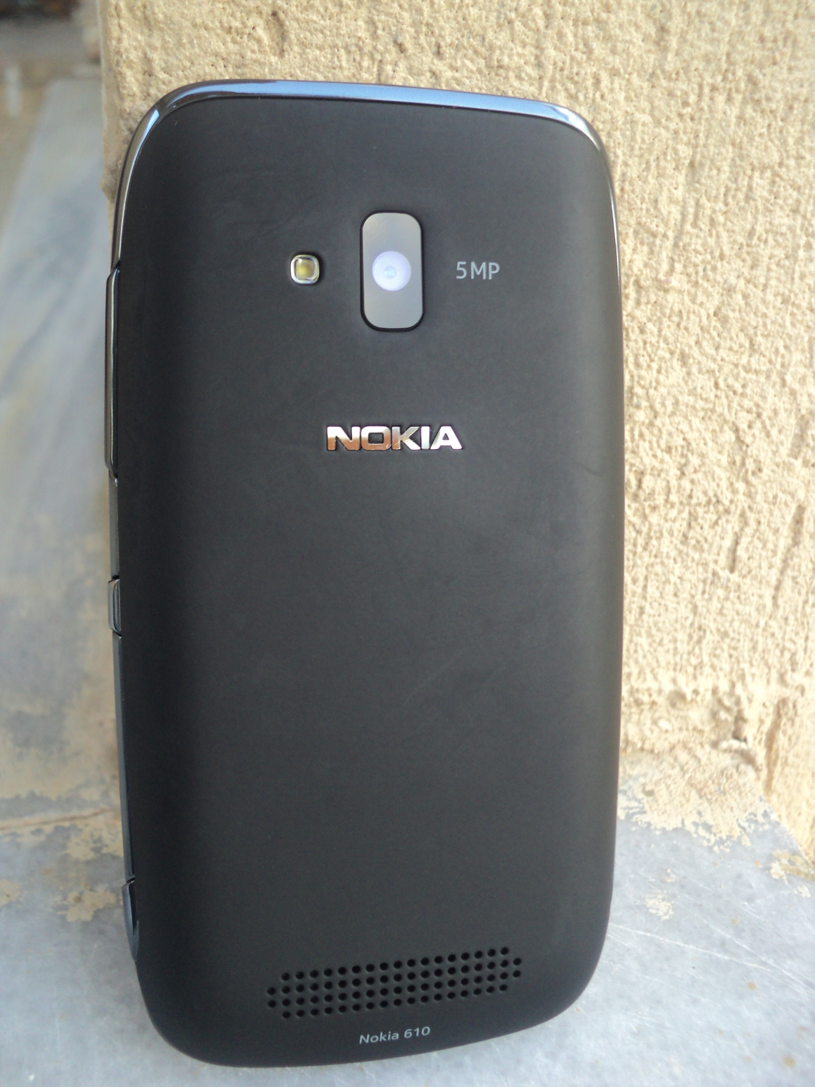 Nokia Lumia 610 mobile phone.